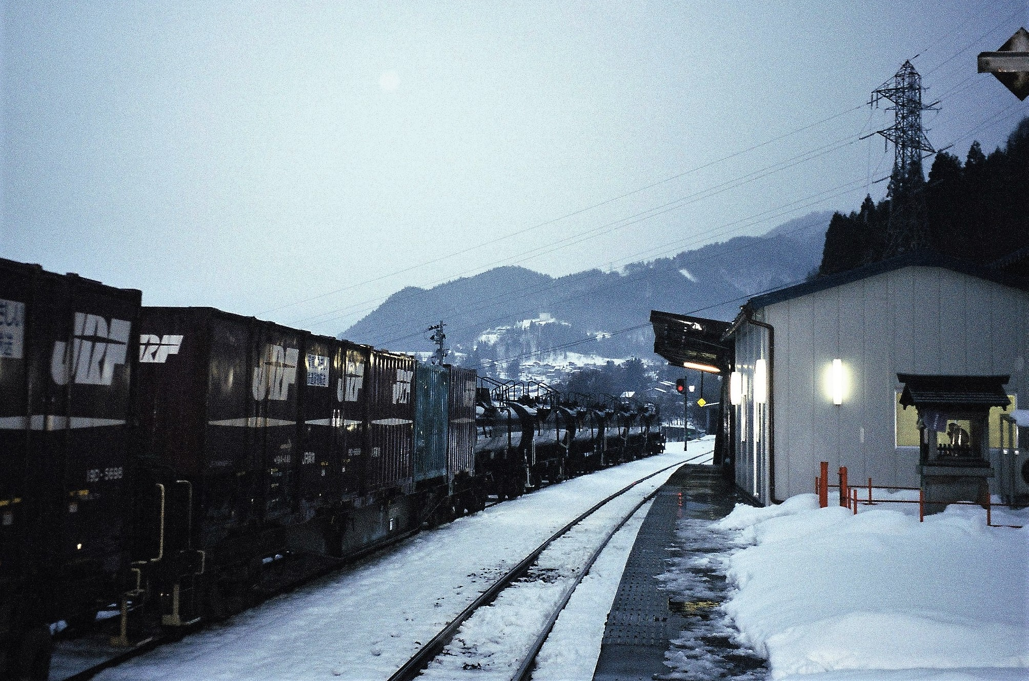 神岡鉱山前駅ホーム（2003年12月撮影）